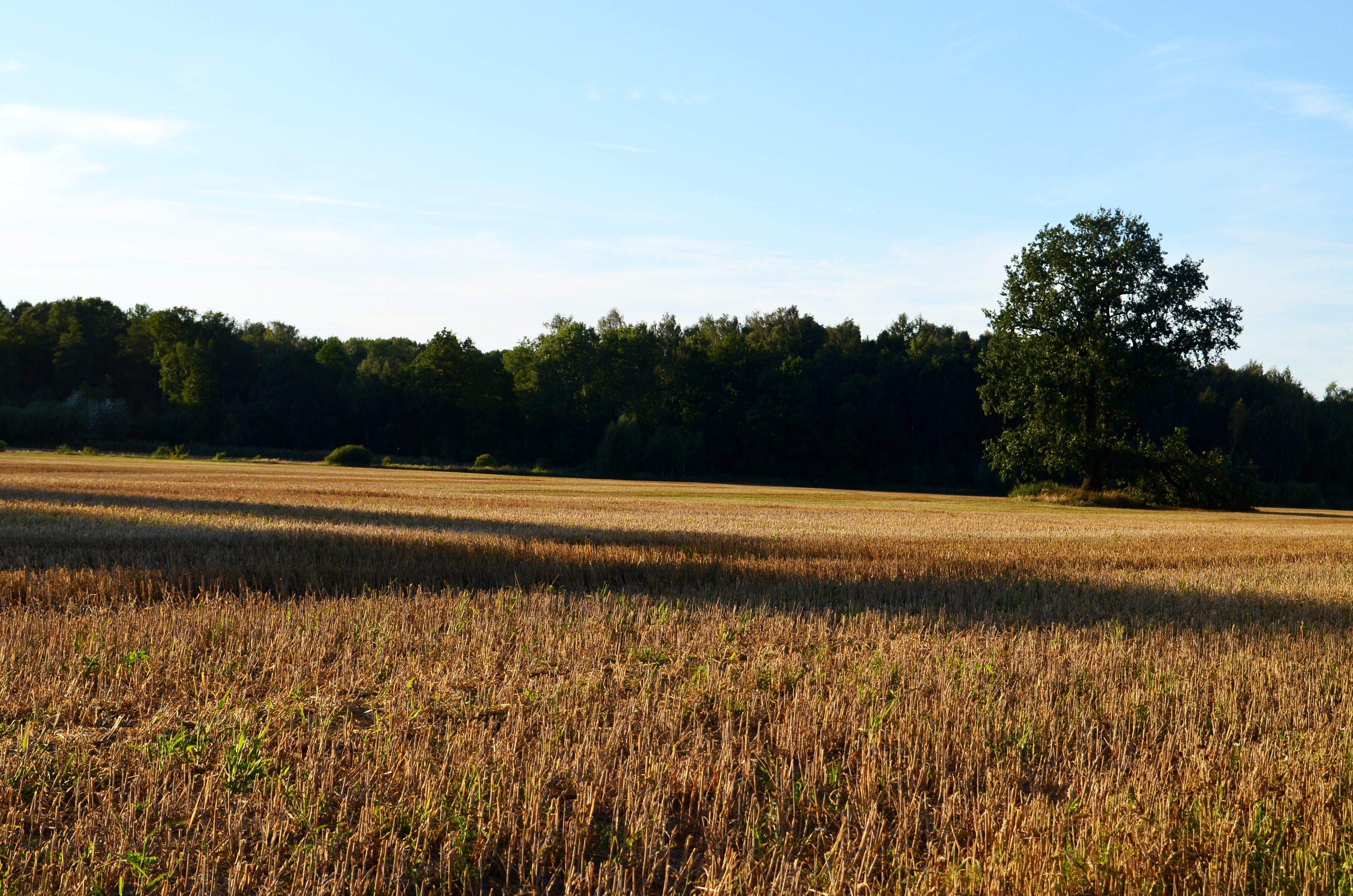 Josvainių miškai, Kėdainių r.